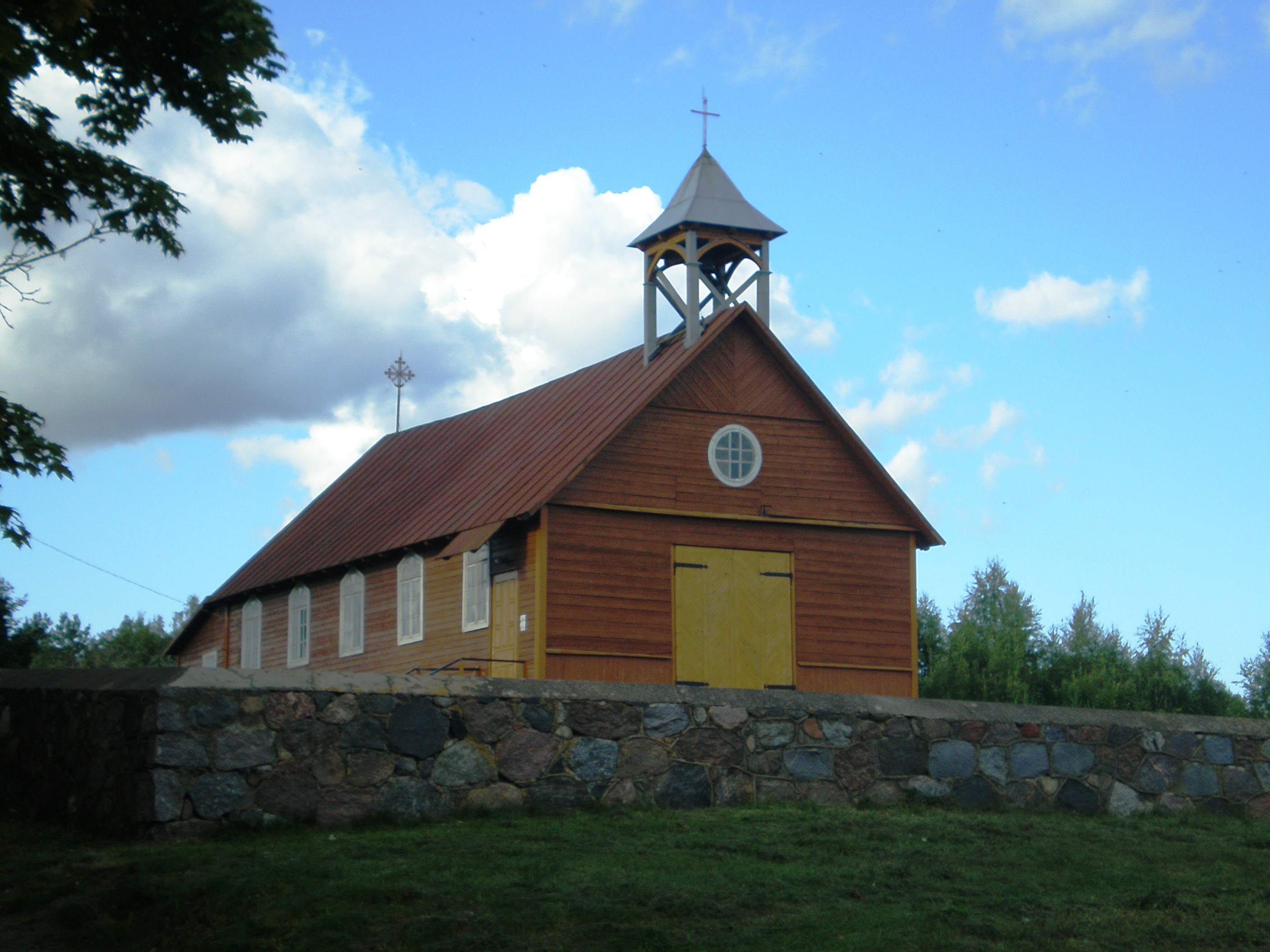 Tilžės bažnyčia, Zarasų raj., Lietuva